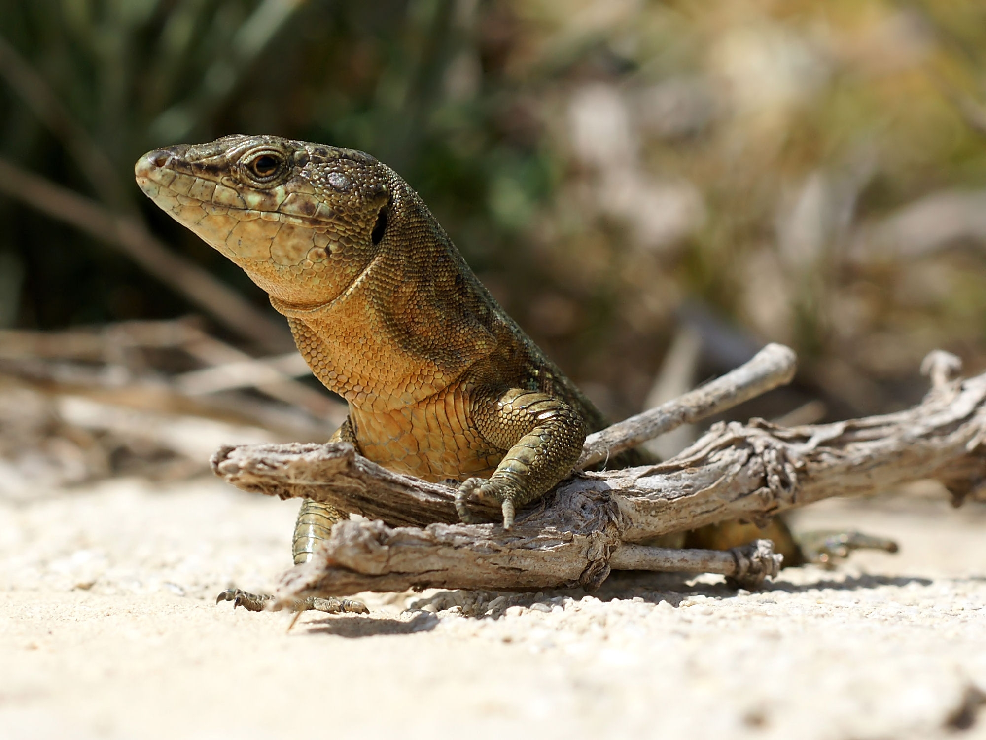 Podarcis lilfordi giglioli